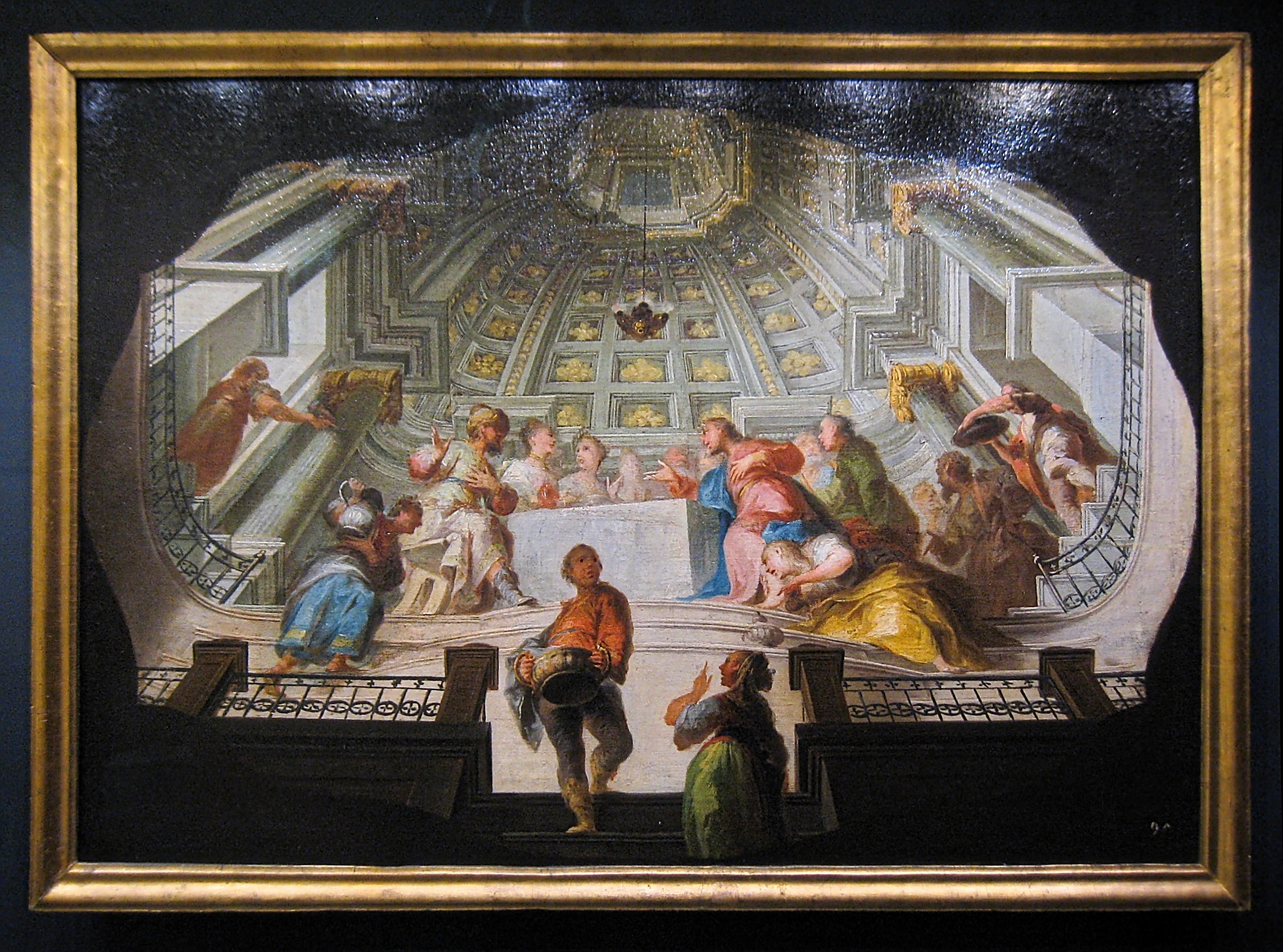 Entwurf Gösers für den Fürstensaal Kloster St. Peter, im Augustinermuseum Freiburg